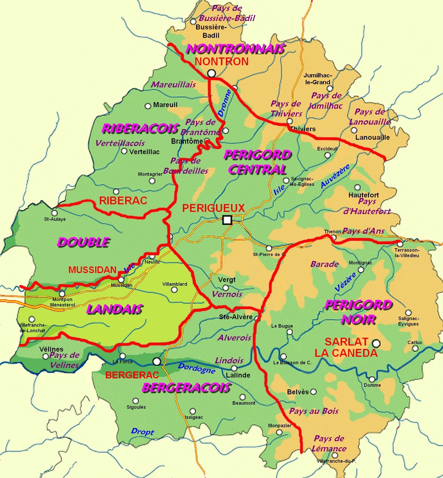 Localisation du Landais sur la carte des pays traditionnels du Périgord.